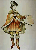 Cumprimento de mandado judicial